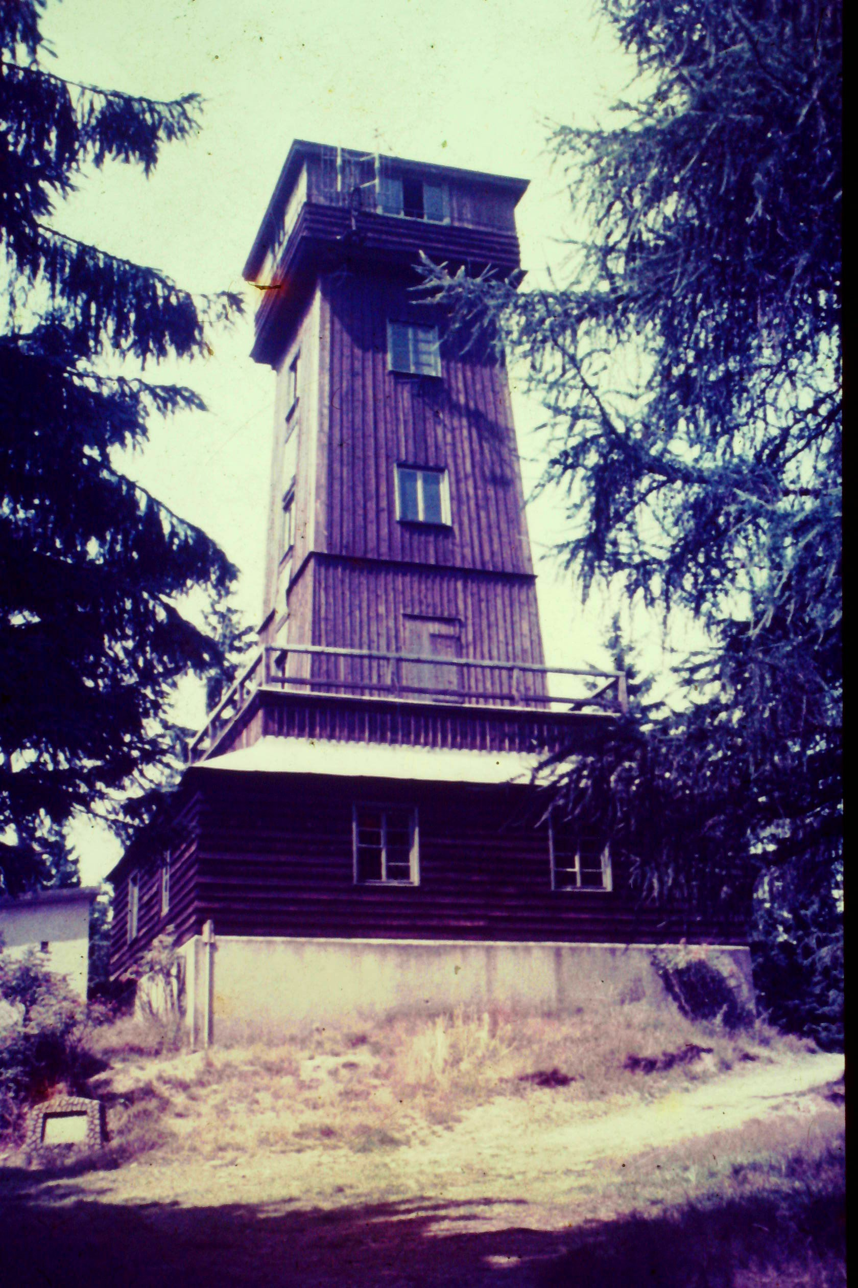 Der alte Aussichtsturm auf dem Kapellenberg wenige Monate vor seiner Sprengung im Jahr 1982